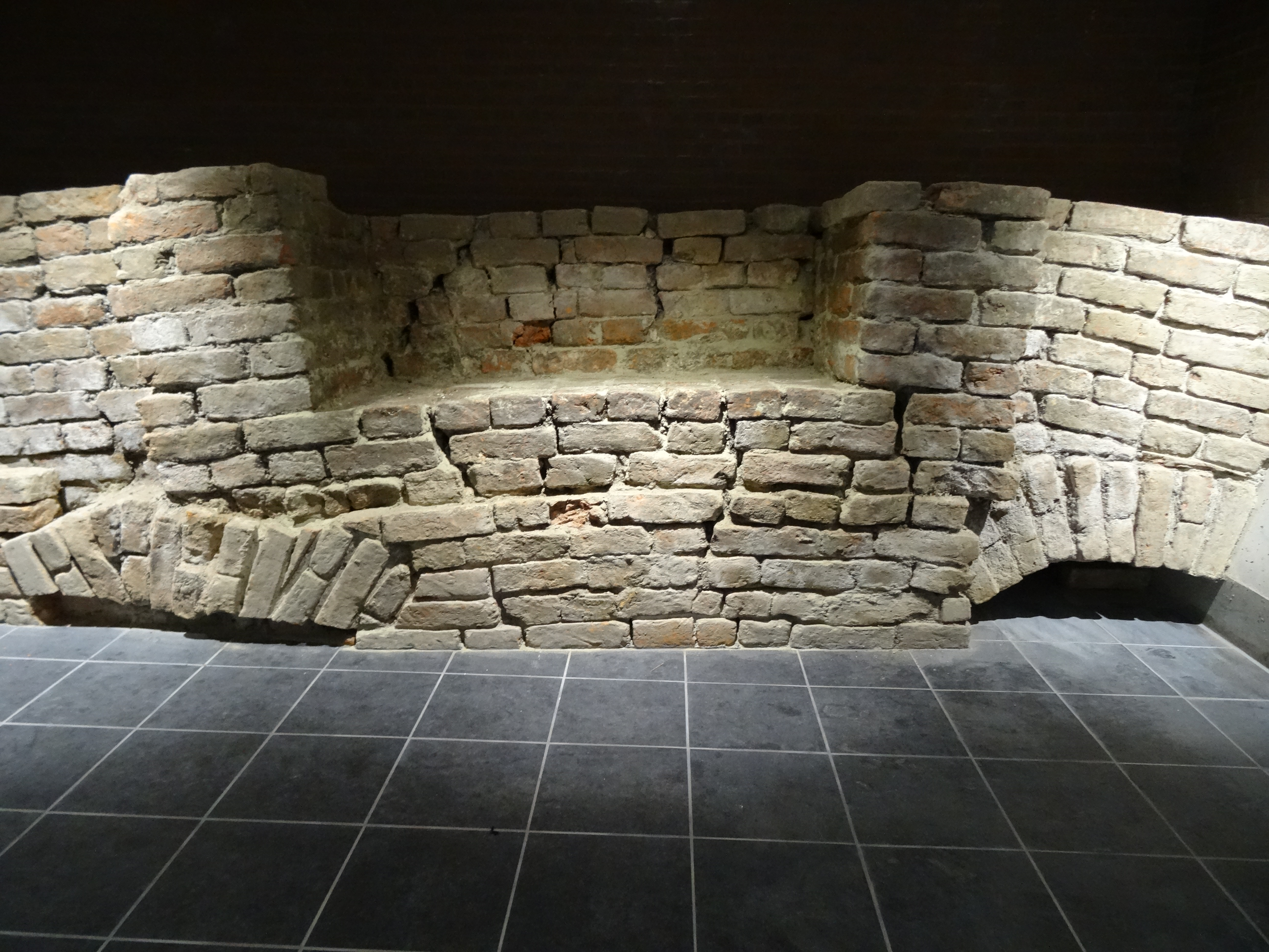 Restant fundering van het Clockhuys in de kelder van Breestraat 90 Leiden